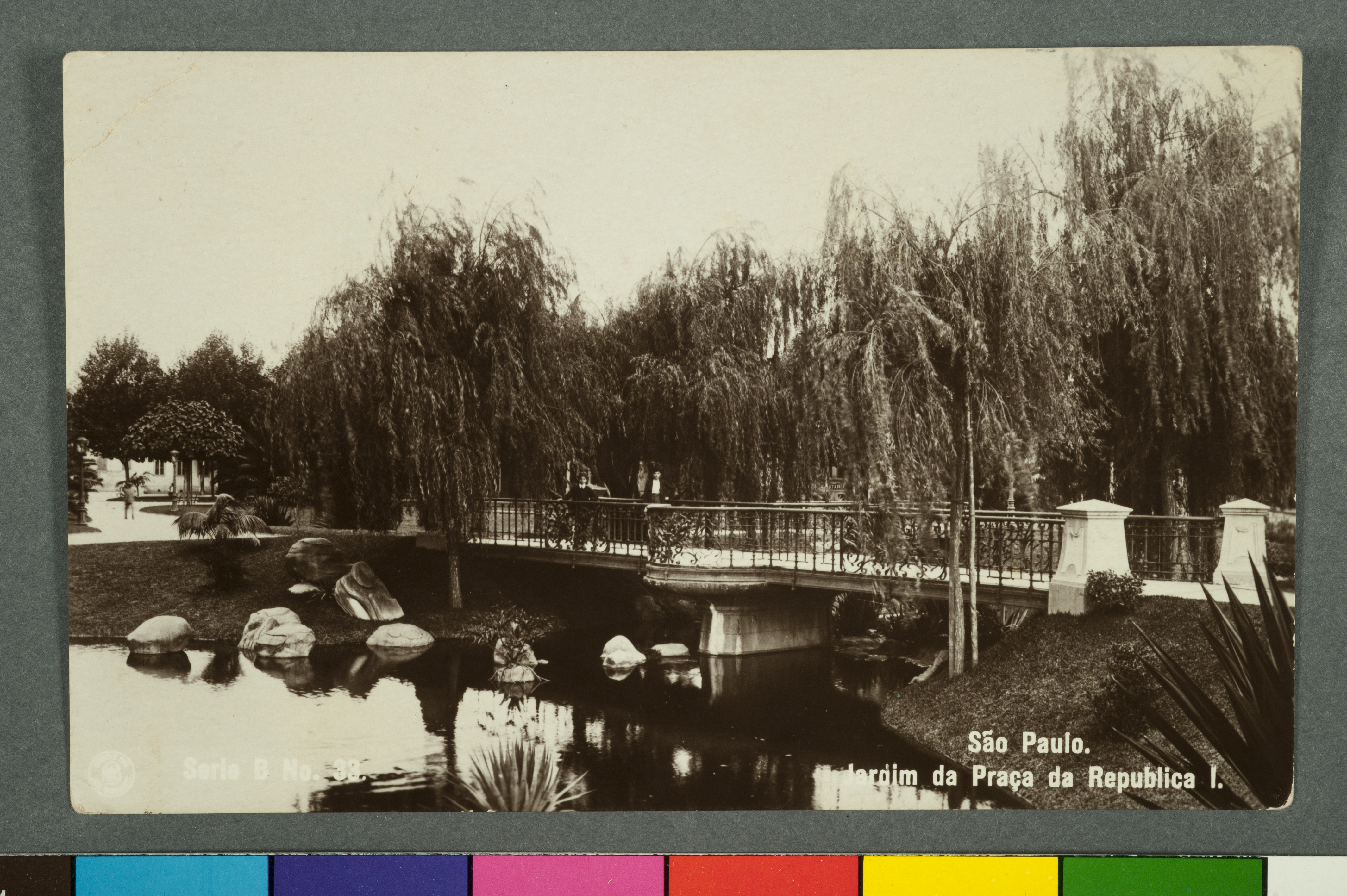 Obra que integra o acervo do Museu Paulista da USP.